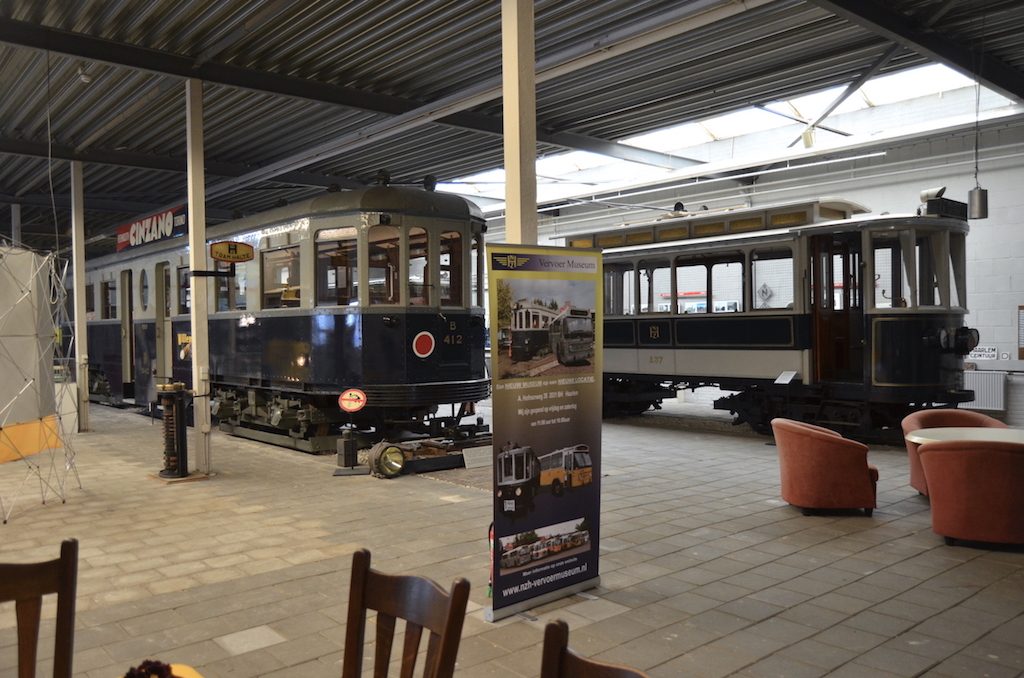 NZH-Vervoermuseum te Haarlem met NZH B412 en A37. Foto: Erik Swierstra.